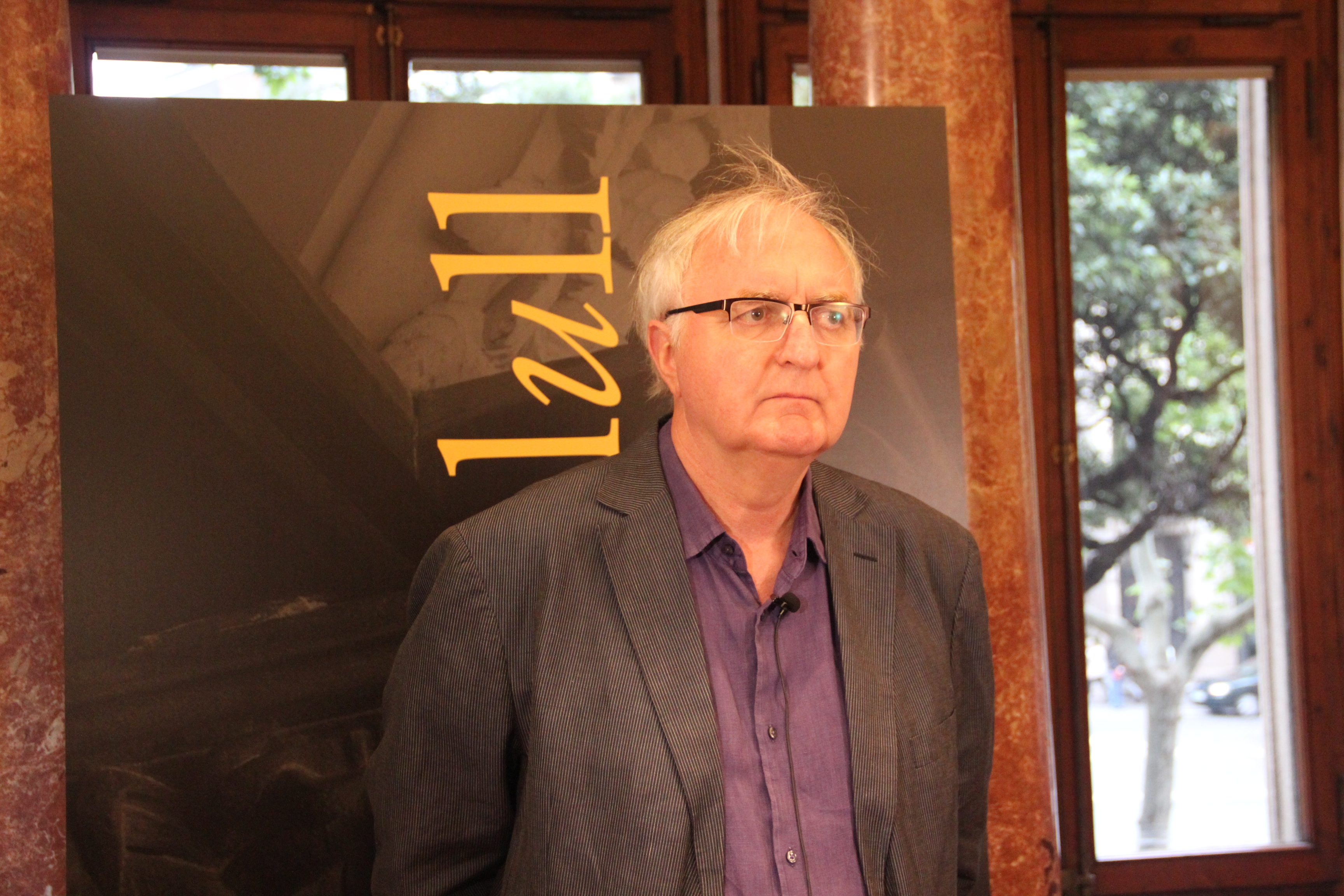 Peter Bush